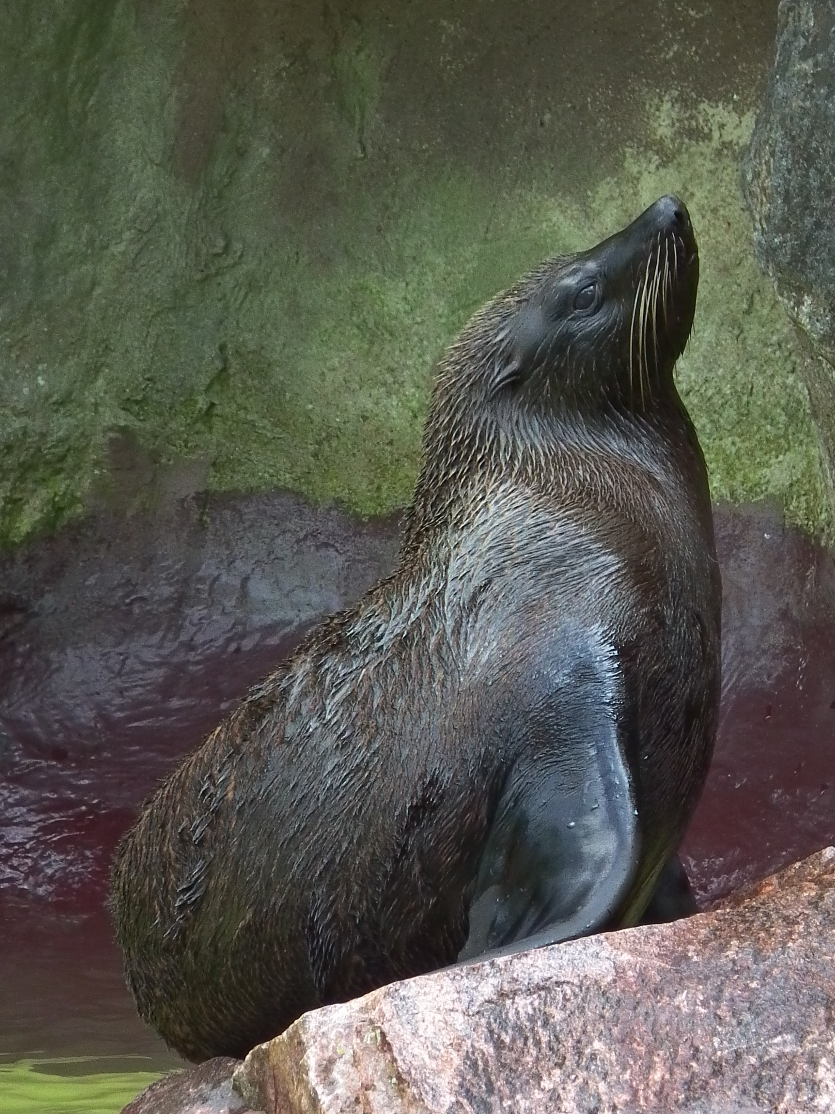 Südamerikanischer Seebär (Arctocephalus australis), fotografiert im Zoo Landau (Rheinland-Pfalz, Deutschland)